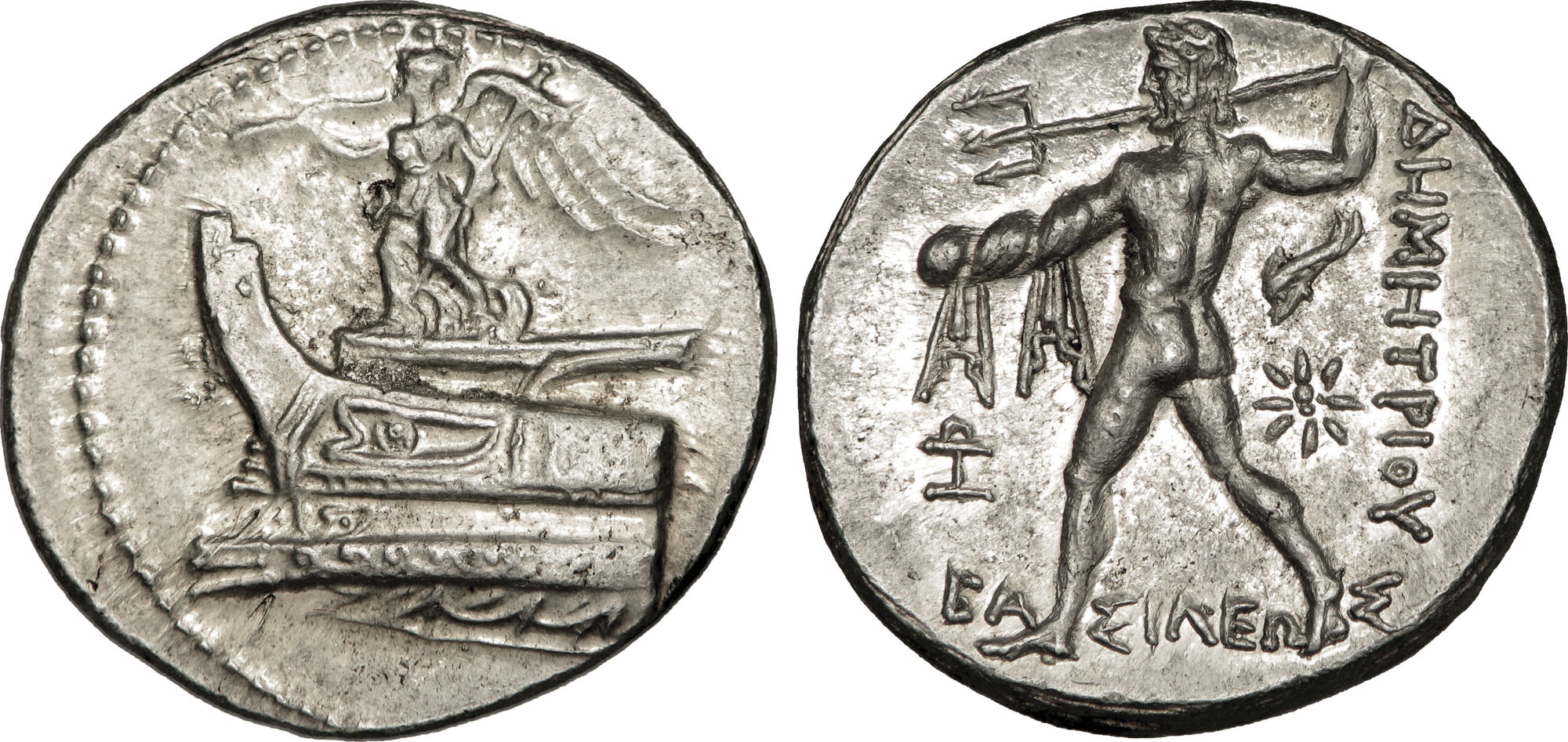 Nom de l'atelier : Macédoine, Pella Métal : argent Diamètre : 26,5mm Axe des coins : 2h. Poids : 17,05g Titulature avers : Anépigraphe. Description avers : Niké debout à gauche, sur une proue de bateau, tenant un stylis de la main gauche et une trompette de la droite ; grènetis circulaire perlé. Description revers : Poséidon nu, marchant à gauche, vu de dos, tenant son manteau de la main droite et brandissant un trident de la main gauche ; dans le champ à droite, un dauphin et dans le champ à gauche, un monogramme ; derrière, un astre à huit rais. Légende revers : BA-SILEW-S / DHMHTRIOU/ (IW) Traduction revers : (du roi Démétrius).